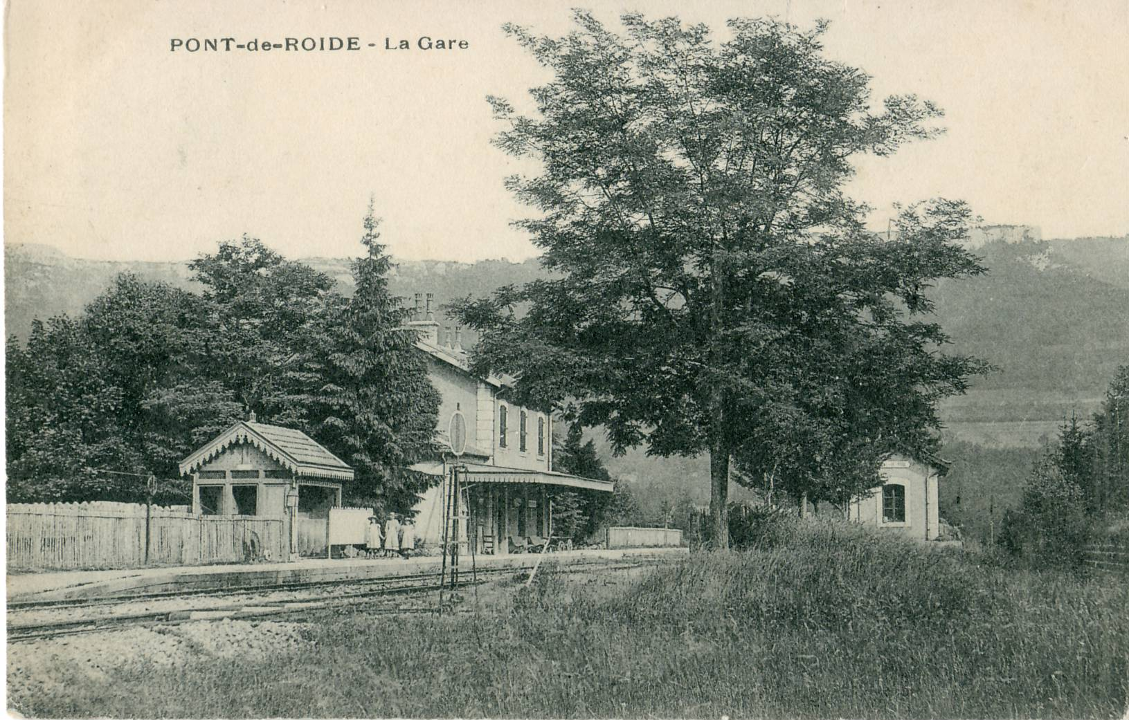 Carte postale ancienne, sans mention d'éditeur PONT-DE-ROIDE : La gare